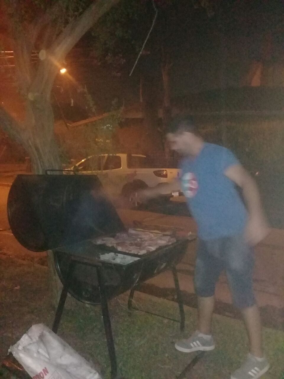 Asando en el "chulengo", asador realizado cortando un barril de combustible al medio para proteger al fuego de los vientos.